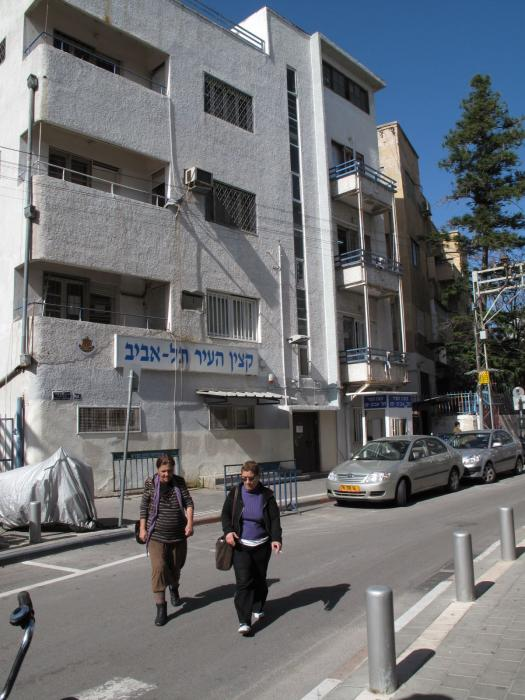 בניין קצין העיר תל אביב